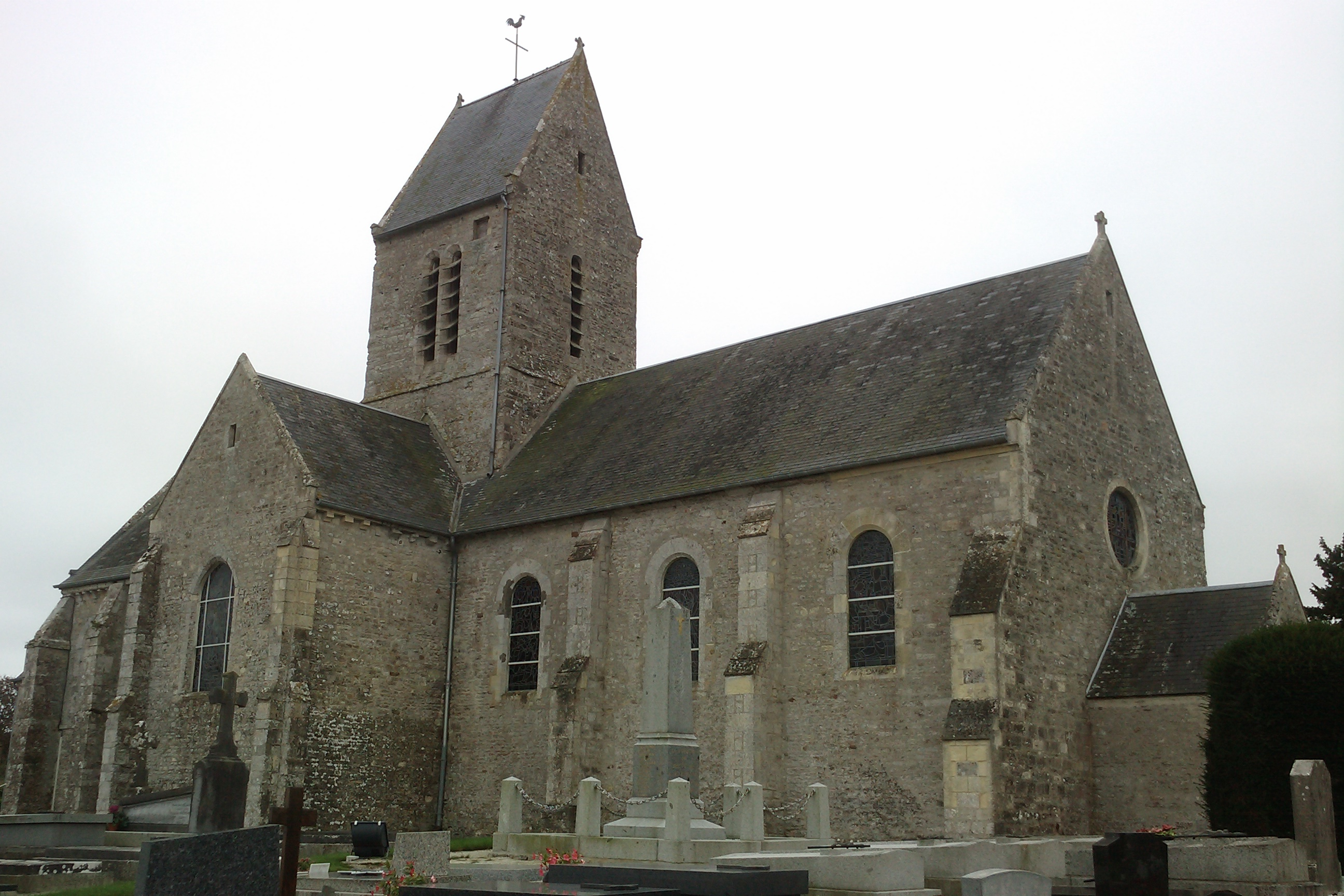 Église Saint-Martin de Brévands